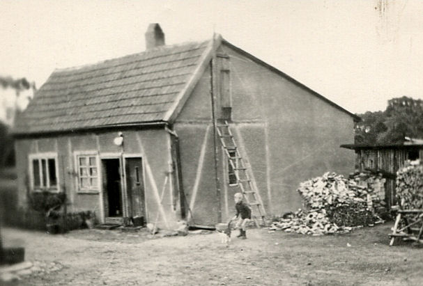 Haus des Teerschwelers in Jellen, Landkreis Parchim, Mecklenburg-Vorpommern, Deutschland